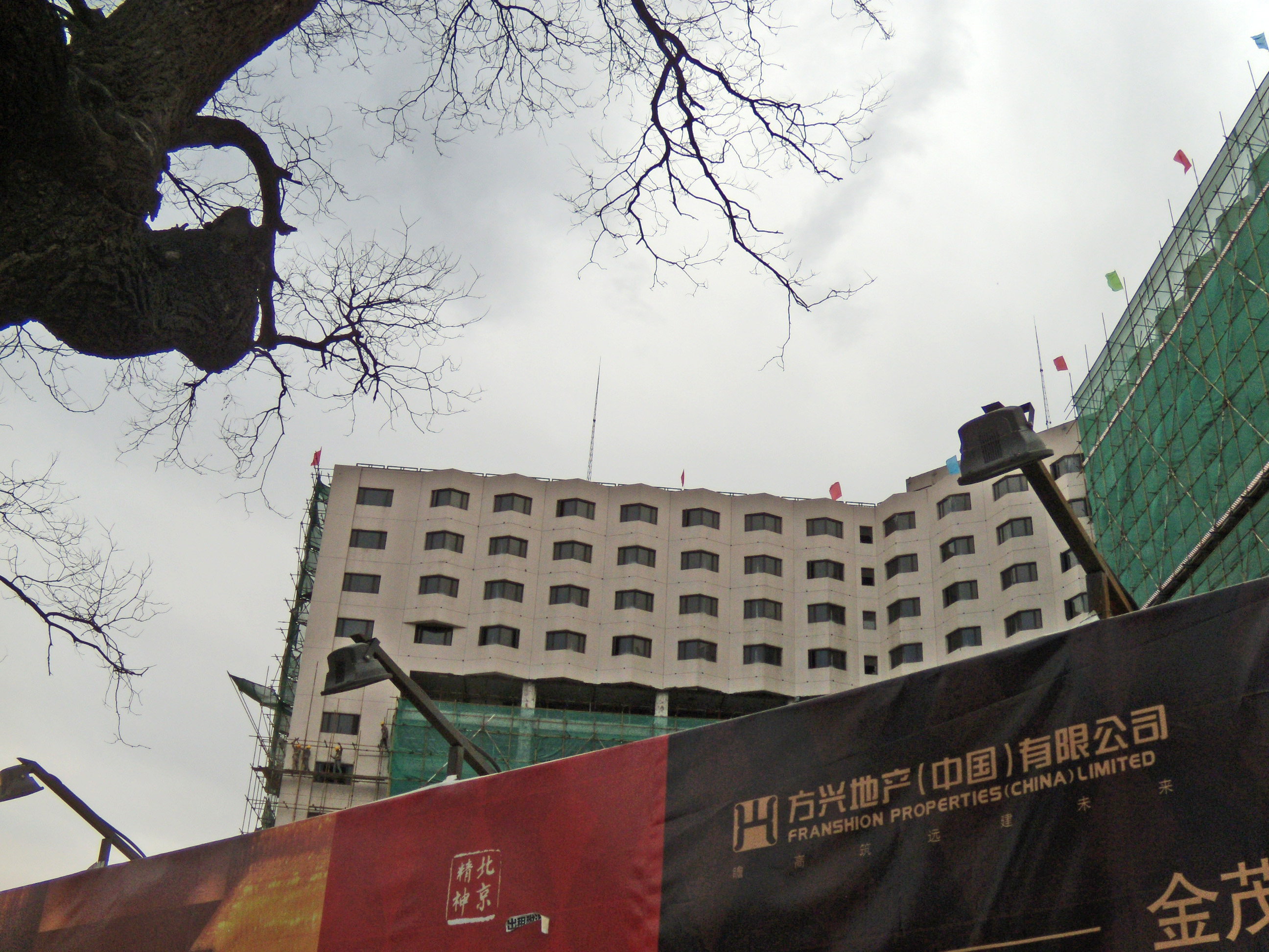 王府井大饭店，位于王府井大街